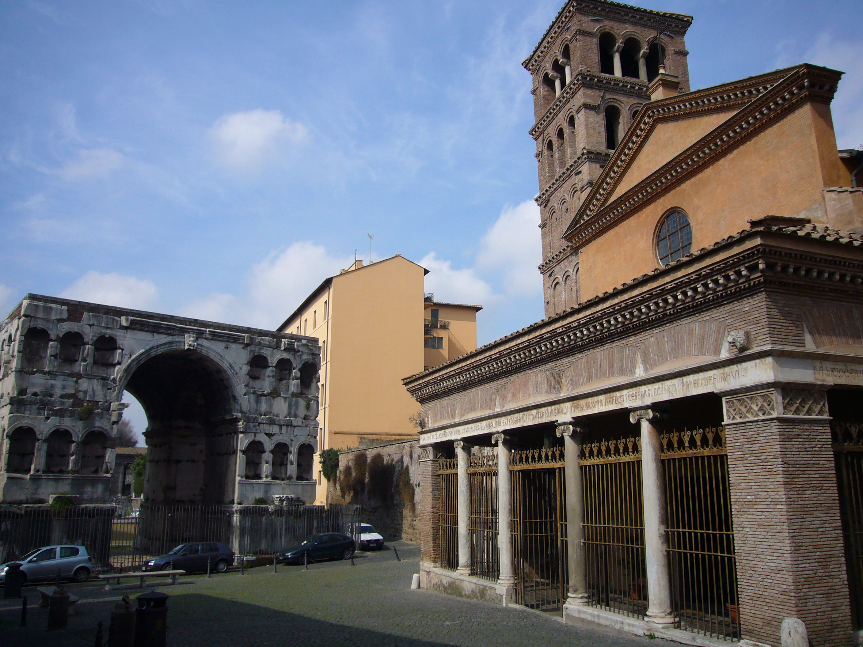 Roma, San Giorgio al Velabro e Arco di Giano. 1700s 2007.